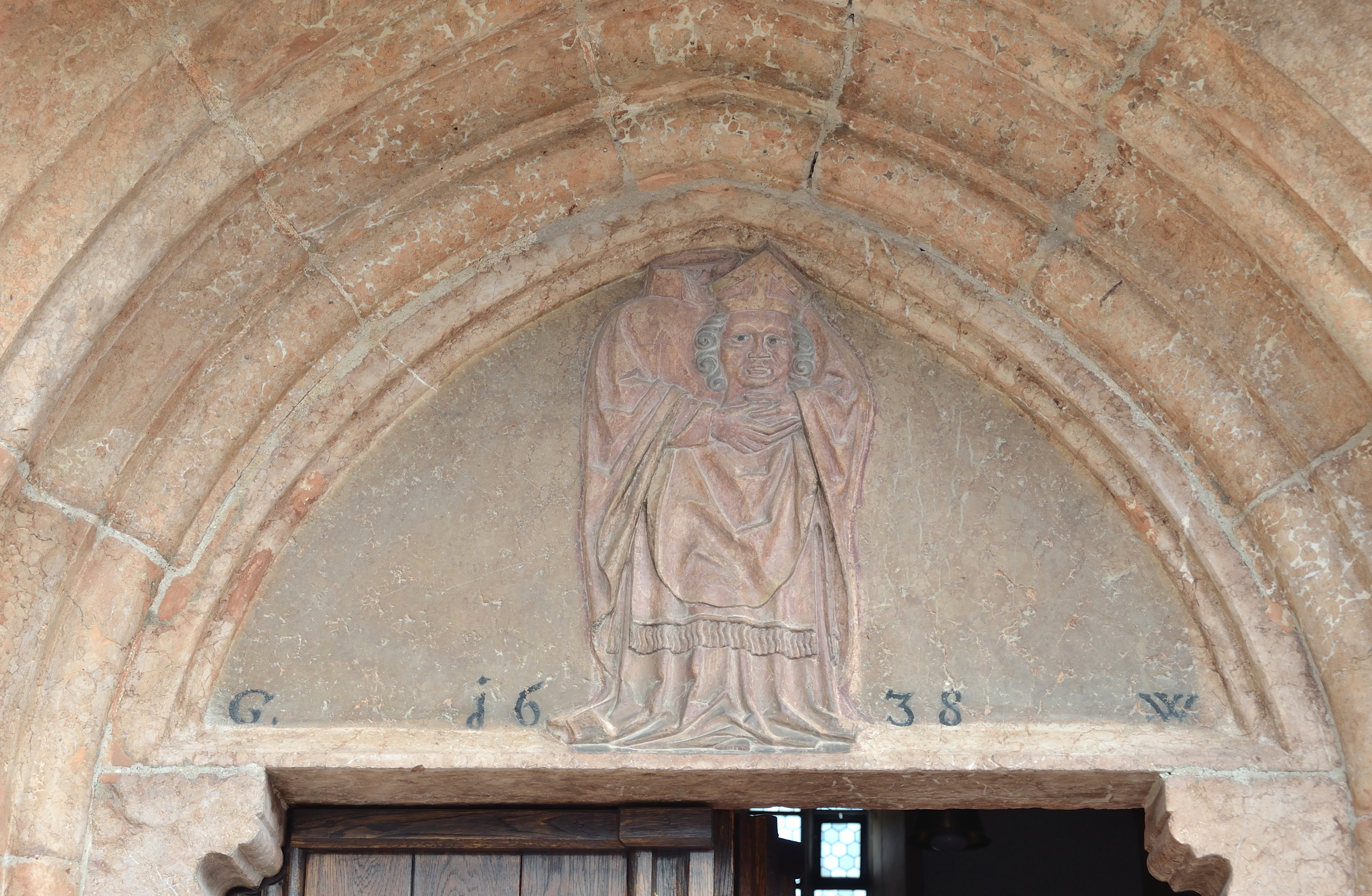 Kath. Pfarrkirche hl. Dionysius in Bad Vigaun, Tympanon mit einem Relief des hl. Dionysius. Signiert G 16 38 W